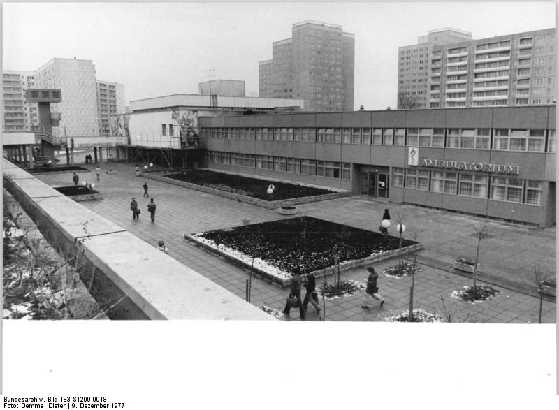 ADN-ZB / Demme / 9.12.77 / Erfurt: Zusammen mit den Wohnhäusern des Erfurter Neubaugebietes Rieth wurde im Norden der Bezirksstadt ein Ambulatorium (Foto) errichtet, das für die medizinische Betreuung auf den Gebieten der Allgemeinmedizin, Stomatologie, Pädiatrie und Gynäkologie der hier lebenden 45.000 Einwohner zuständig ist. Das Rieth-Ambulatorium wurde in das gesellschaftliche Zentrum des Neubauviertels eingegliedert.